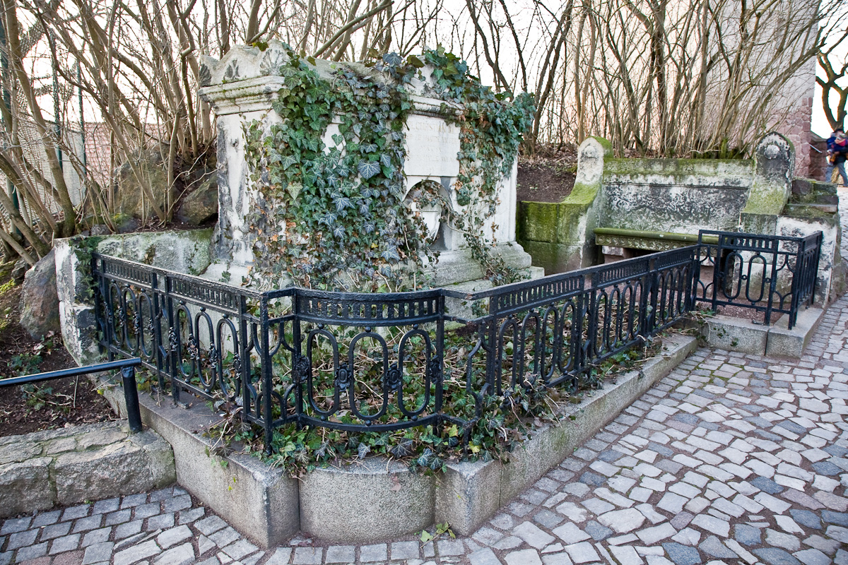 Grab von Johann Christian Reil auf dem Reilsberg in Halle (Saale), heute Bergzoo Halle